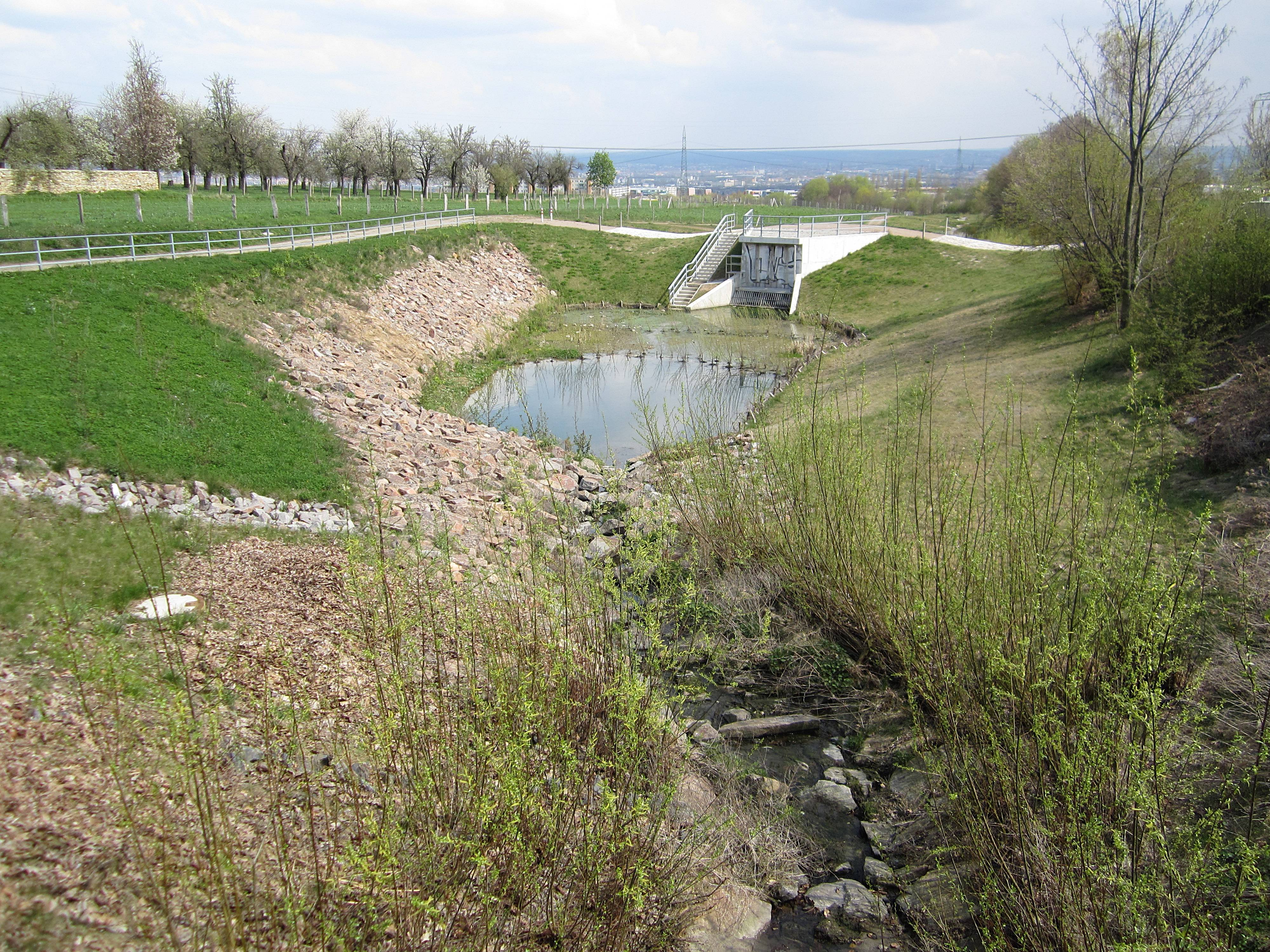 Rückhaltebecken an der Brücke über den Weidigtbach, Gompitz